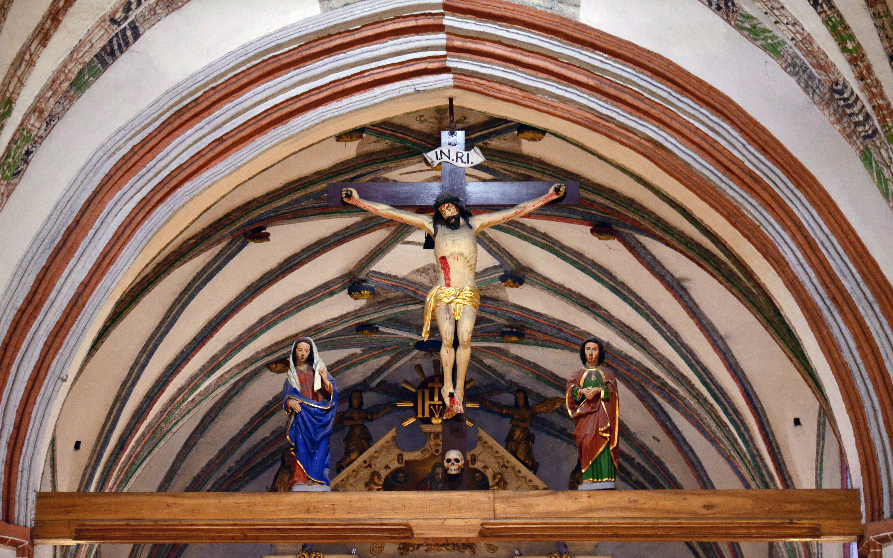 Brodnica, ul. Farna - rzymskokatolicki kościół parafialny pw. św. Katarzyny, 1285-XIV (belka tęczowa)